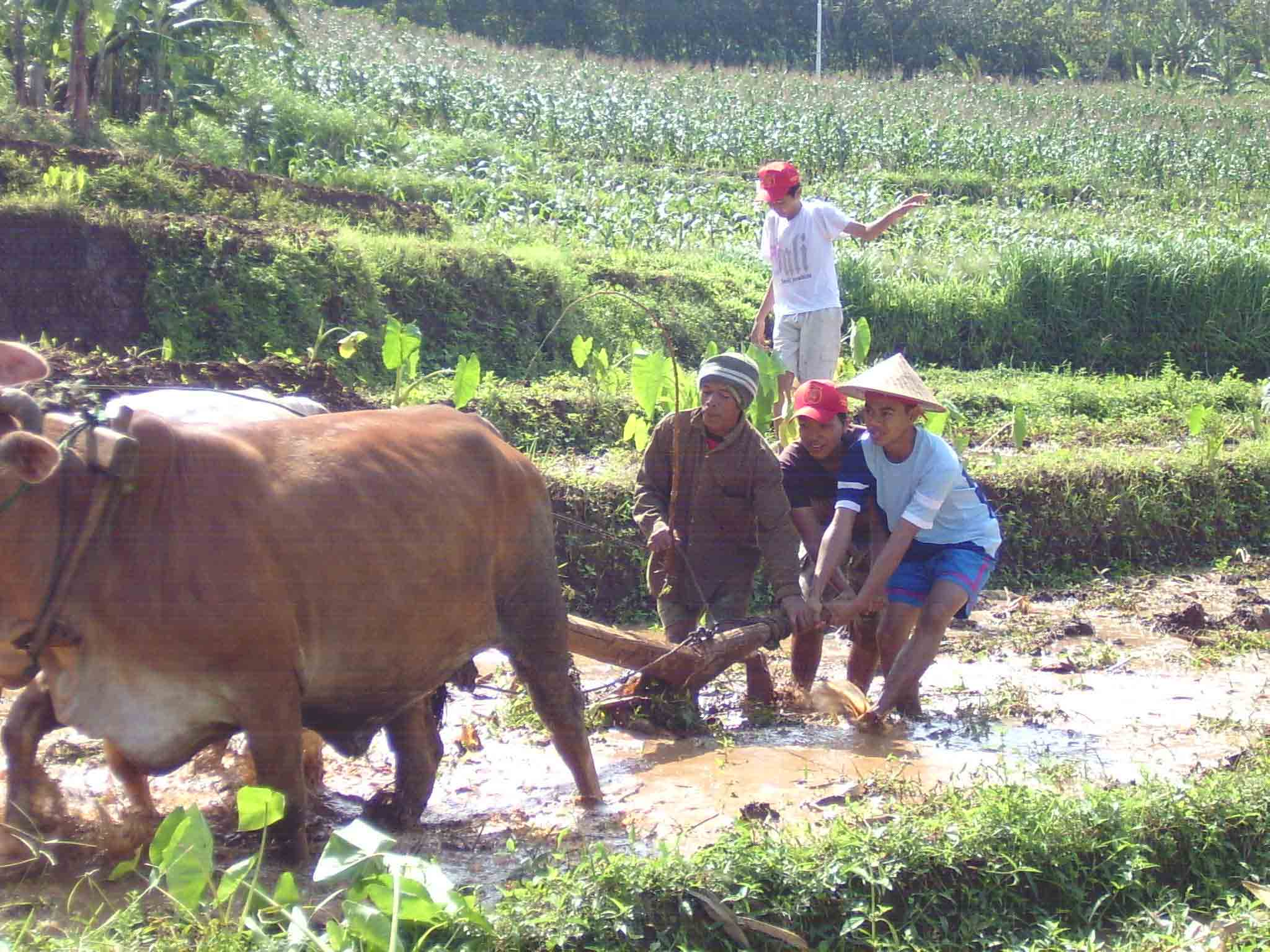 Beberapa siswa sedang membajak sawah dengan kerbau dalam kegiatan Live In, di desa Sukomangli, Kecamatan Patean, Kabupaten Kendal, Jawa Tengah